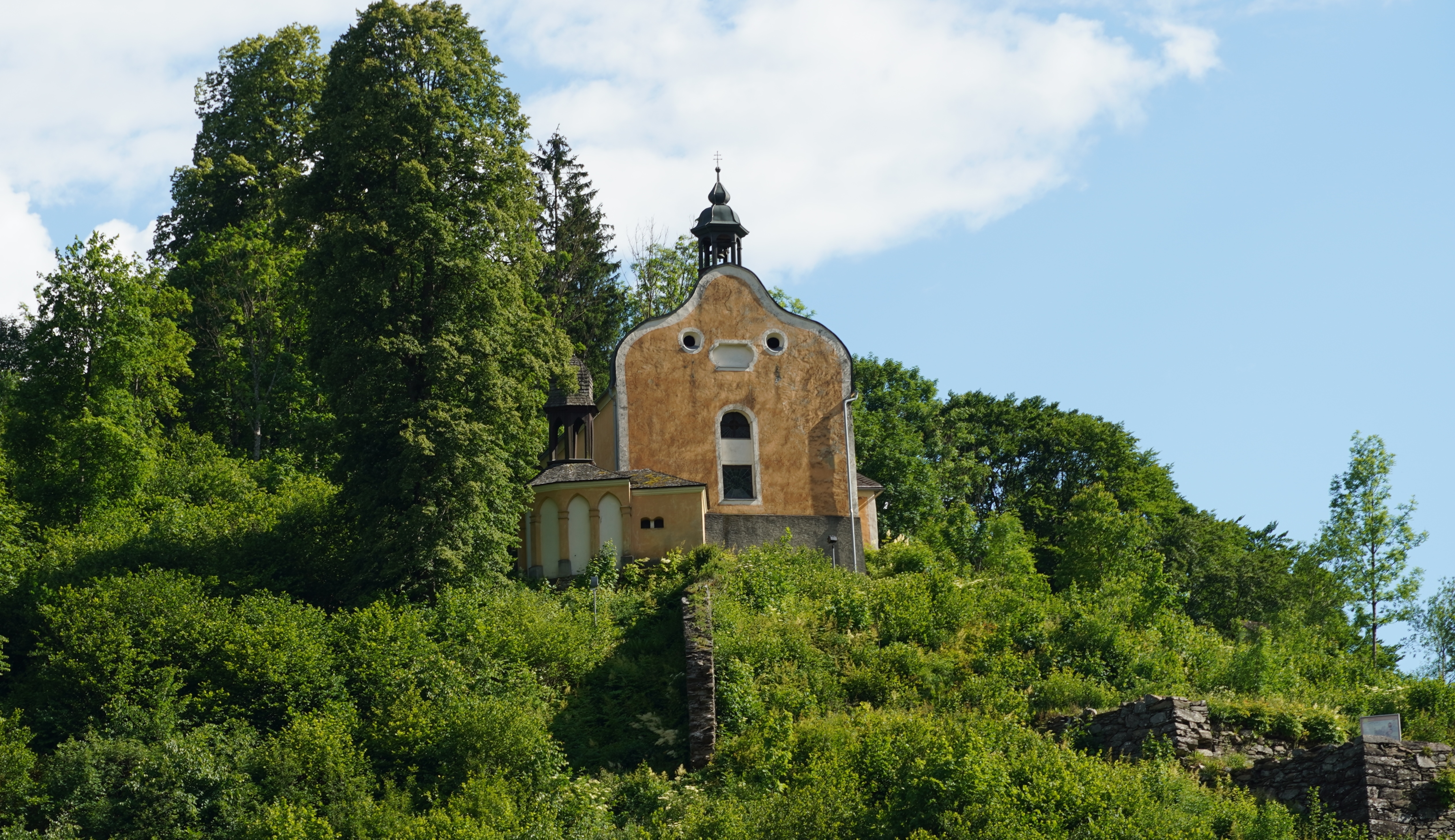 Kalvarienbergkapelle und Heiliggrabkapelle Sachsenburg